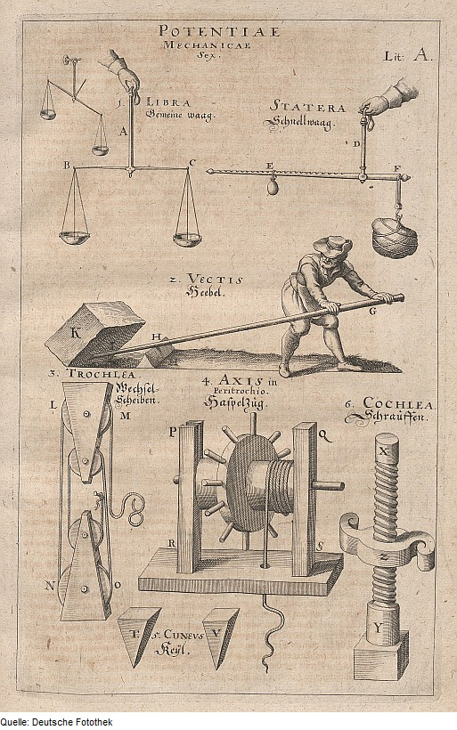 Original image description from the Deutsche Fotothek Mechanik & Hebezeug & Wiegeeinrichtung & Haspel & Hebel